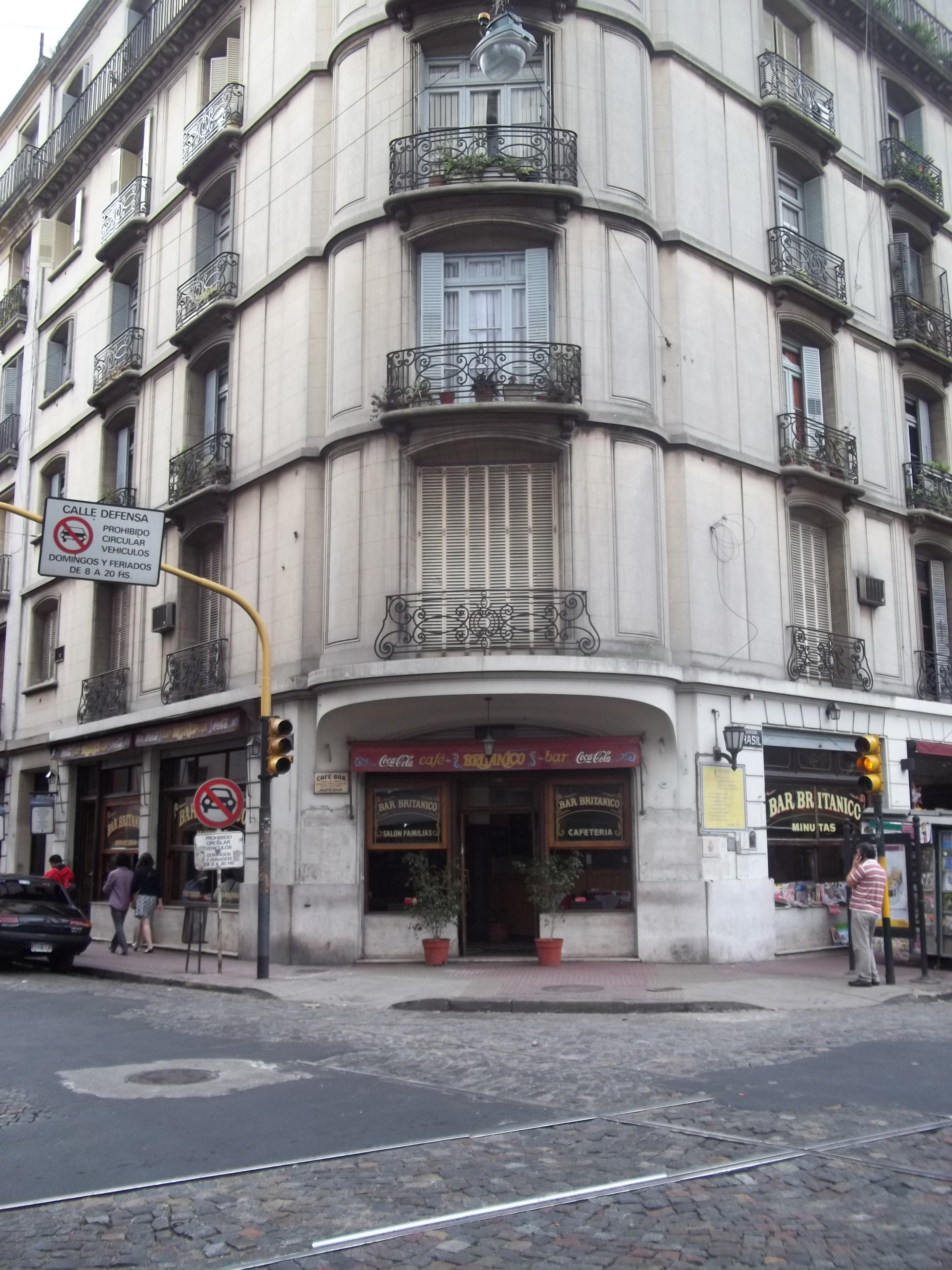 Bar Británico